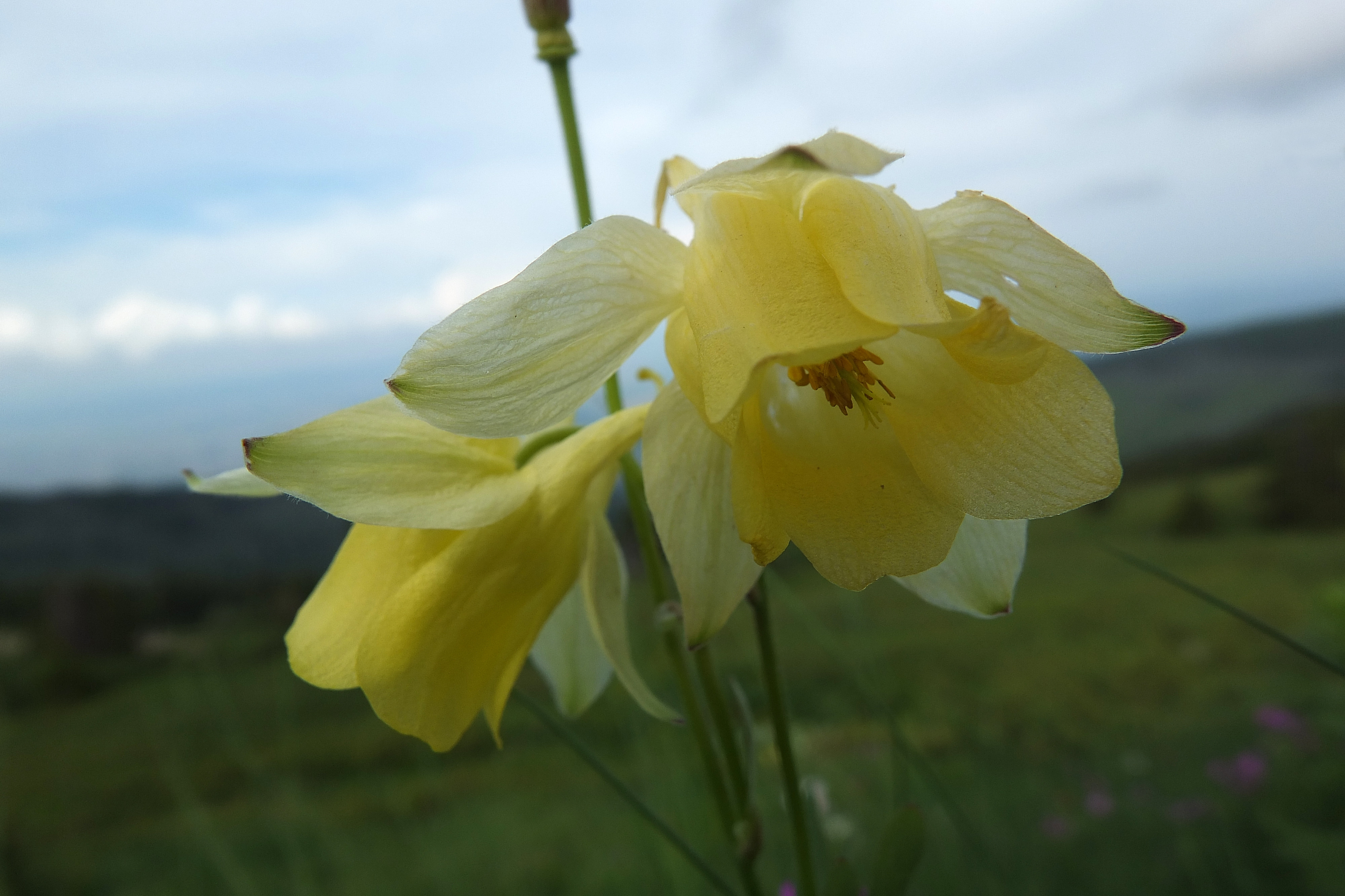 Витоша, Витоша Златиста кандилка (Aquilegia chrysantha var. aurea), на фона на резерват Бистришко бранище